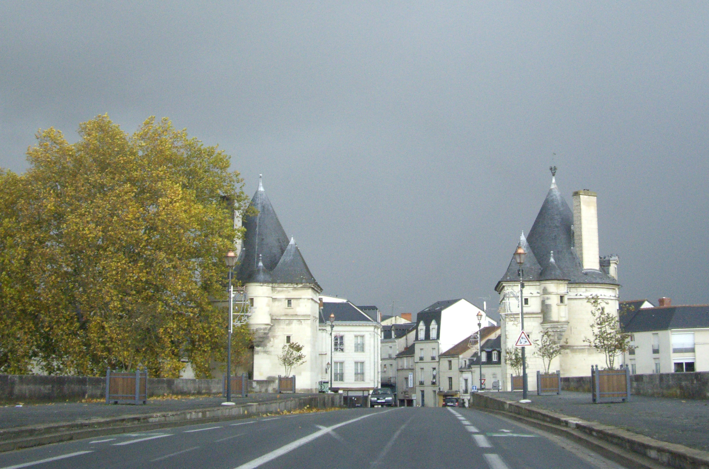 Le pont Henri-IV - Vue des deux tours caractéristiques depuis le tablier du pont.